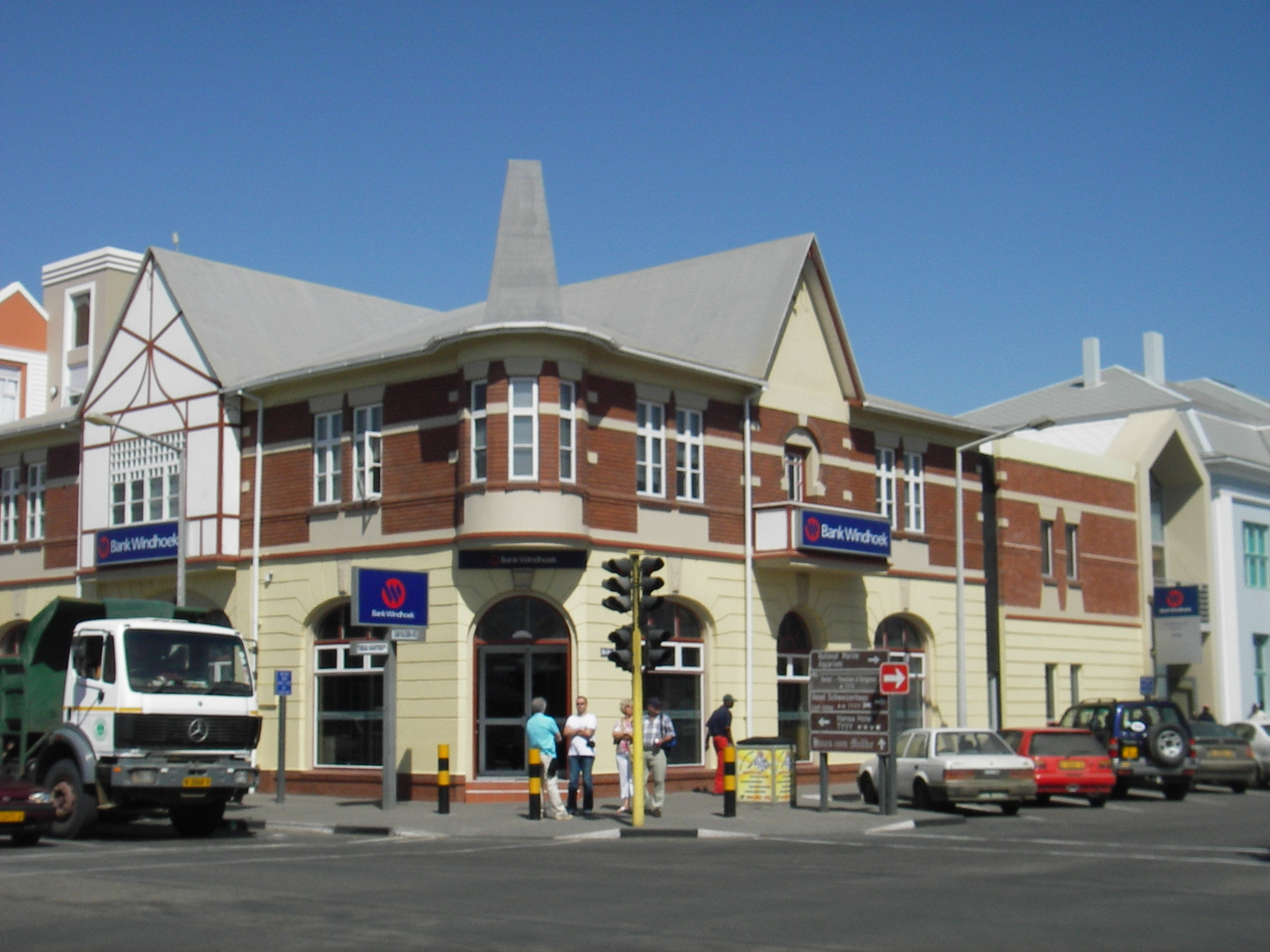 Häuser in Swakopmund